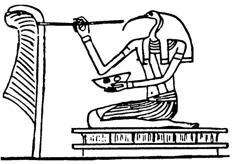 Djehutij.jpg